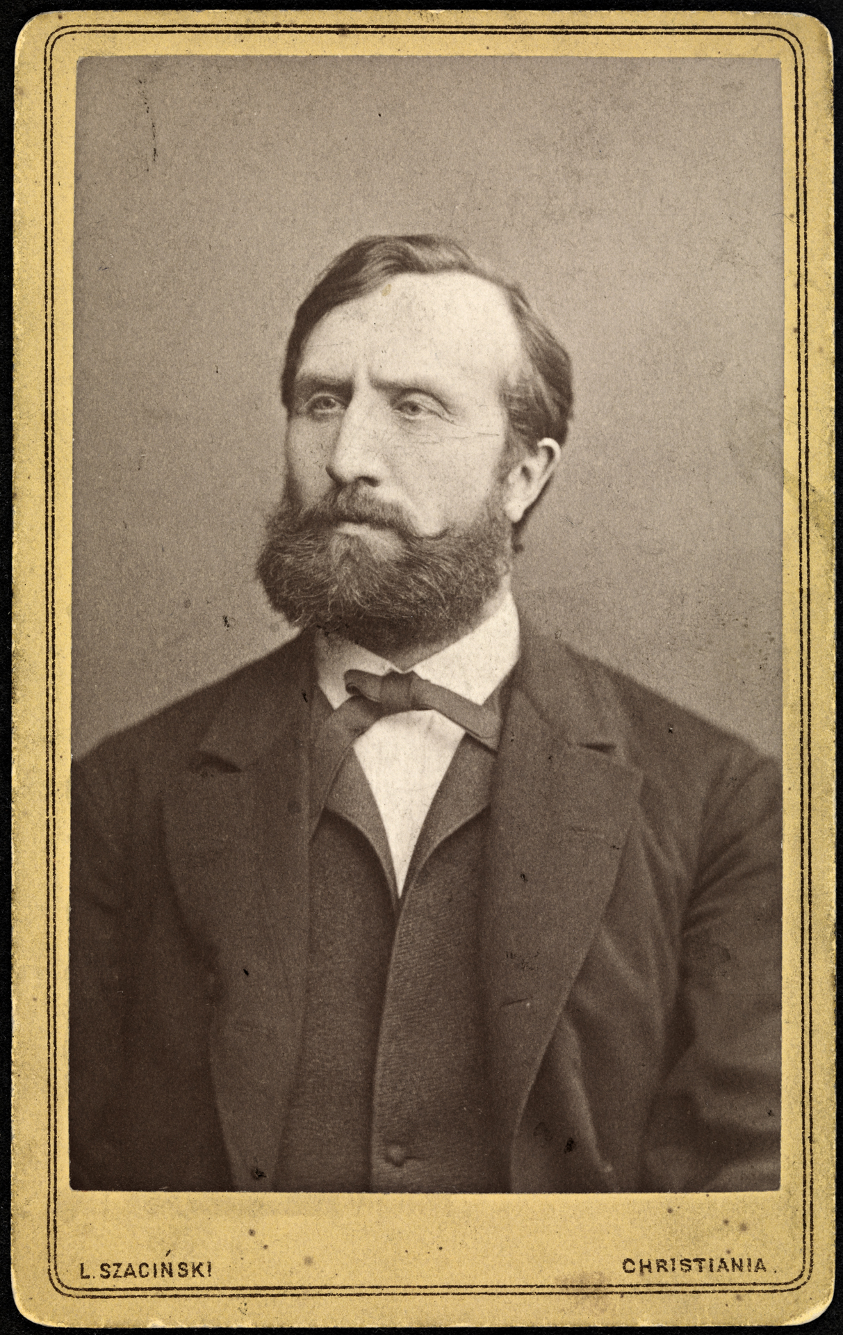 Tittel / Title: Portrett av Hagbard Berner (1839-1920) Motiv / Motif: Visittkort. Berner var politiker og publisist, og fra 1869-1879 var han redaktør for Dagbladet. I 1884 stiftet han Norsk Kvindesagsforening sammen med Gina Krog, og var dens første formann. Dato / Date: ca 1880 Fotograf / Photographer: L. Szacinski (Christiania) Sted / Place: Oslo Eier / Owner Institution: Nasjonalbiblioteket / National Library of Norway Lenke / Link: Bildesignatur / Image Number: blds_03132